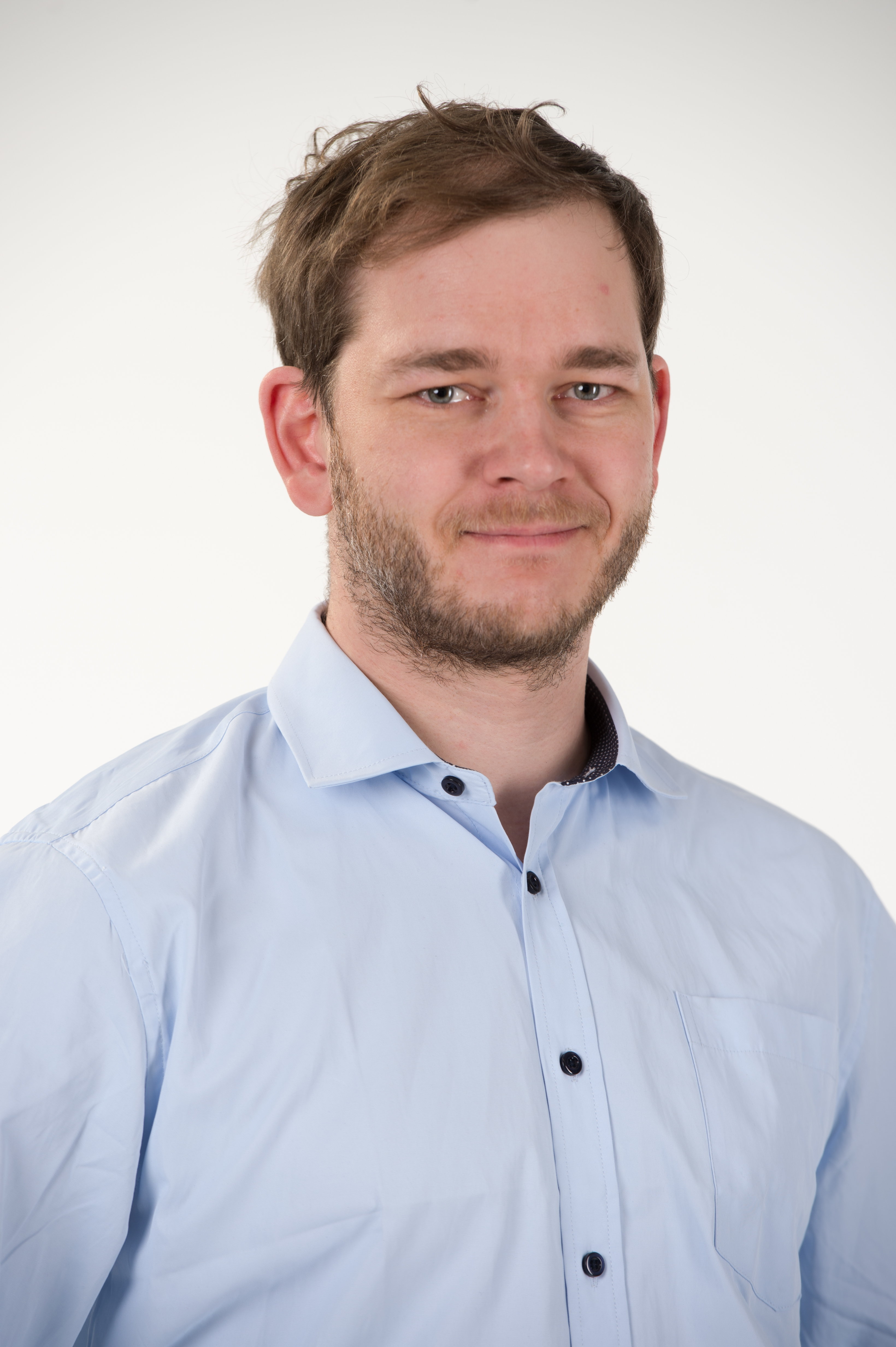 Madis Aesma